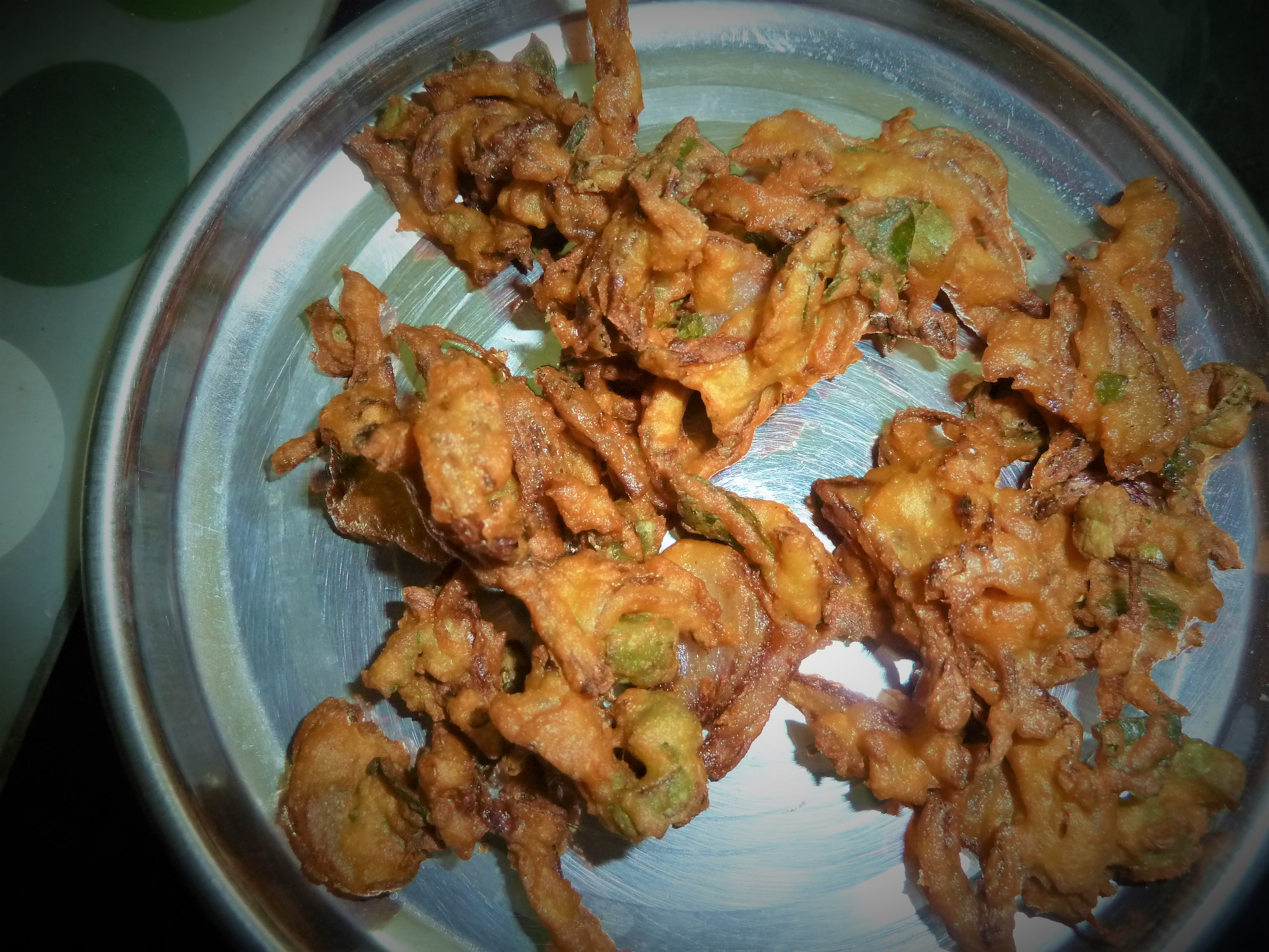 ఉల్లిపాయ పకోడీ